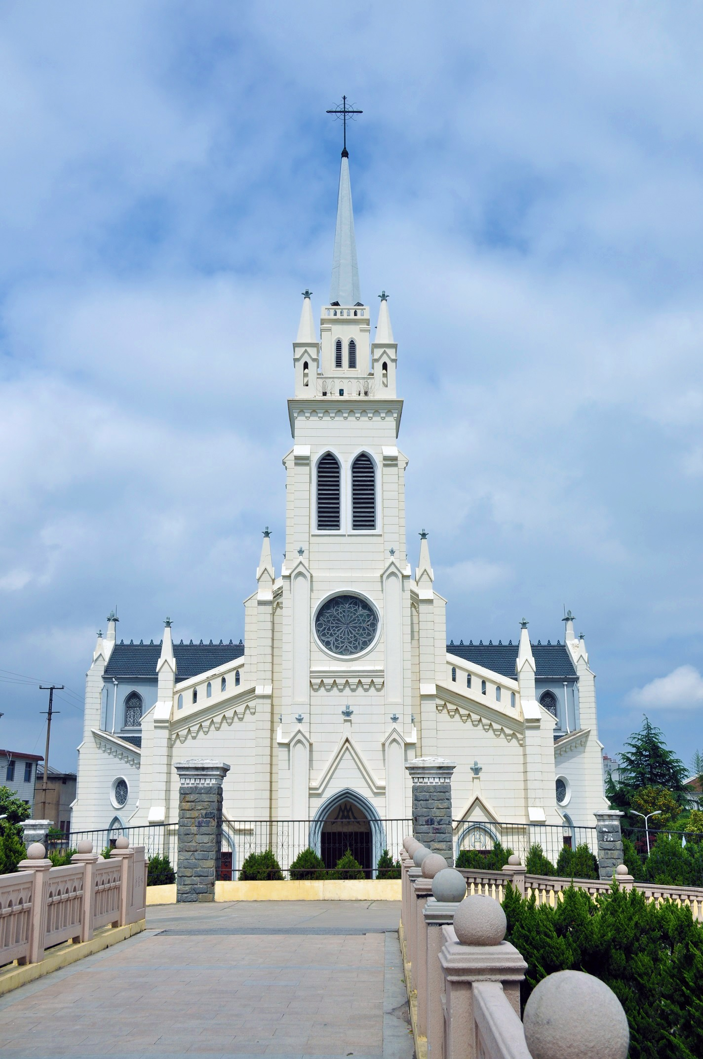 中文（中国大陆）: 浦东唐墓桥露德圣母堂 浦东唐墓桥唐镇街40号 1898